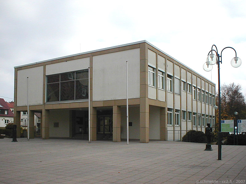 Rathaus (erbaut 1965, saniert 1995) in Sulzfeld (Baden), Baden-Württemberg, Deutschland